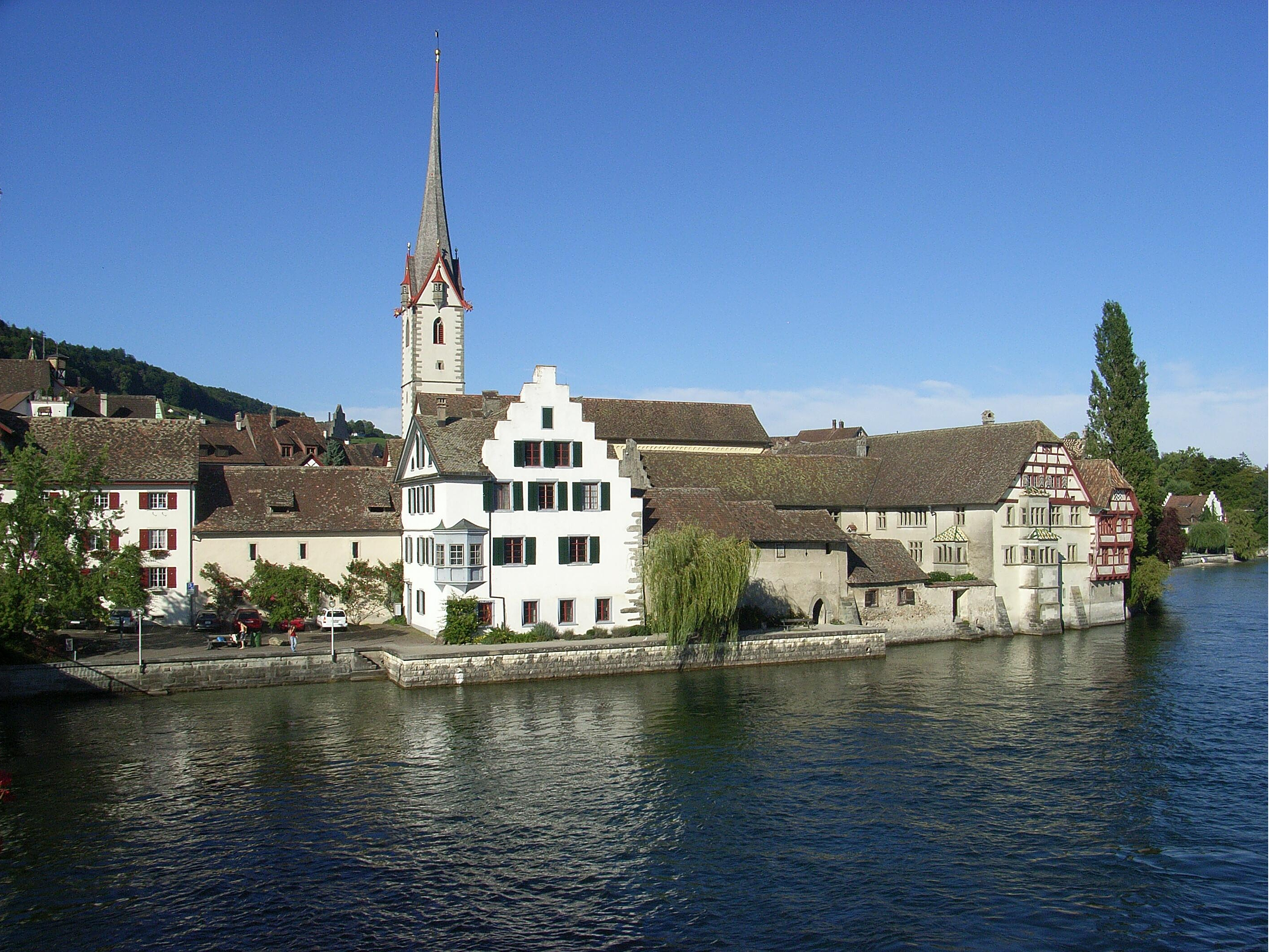 Dieses Bild zeigt das Panorama von Stein am Rhein im Osten.